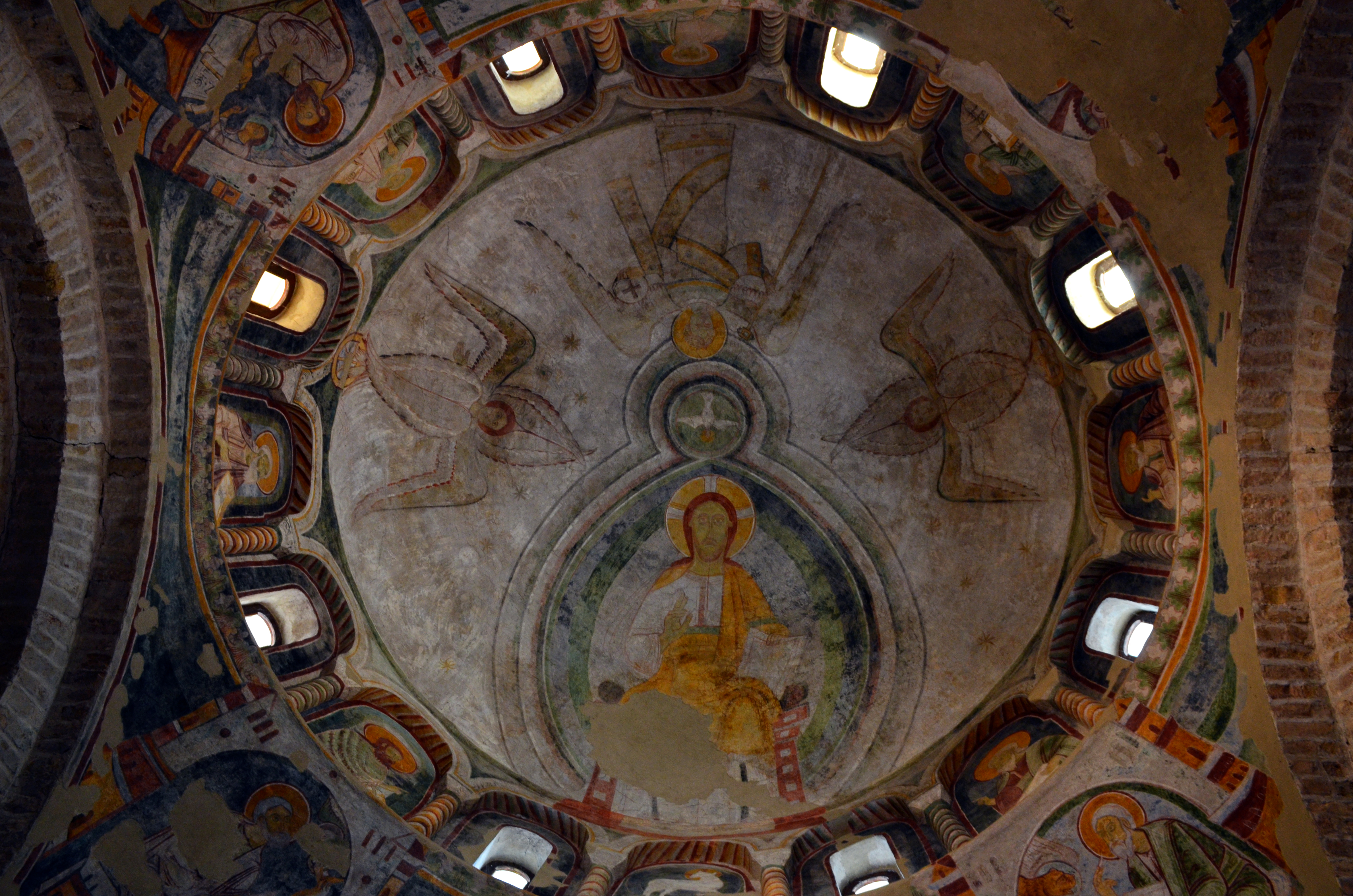 Area archeologica della Basilica Paleocristiana di Concordia Sagittaria - MIBAC This is a photo of a monument which is part of cultural heritage of Italy.